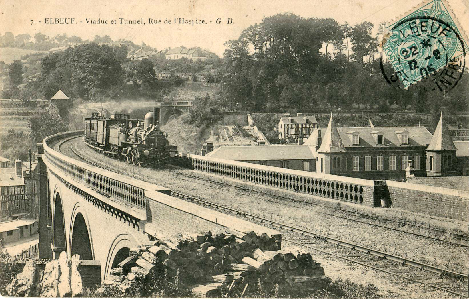 Carte postale ancienne éditée par G. B., n°7 :ELBEUF - Viaduc et Tunnel, rue de l'Hospice.Il s'agit du Viaduc de l'Hospice (166 m) et du Tunnel des Rouvalets (38 m.) sur la ligne de Saint-Georges-Motel à Grand-Quevilly (Ligne de Rouen à Orléans)